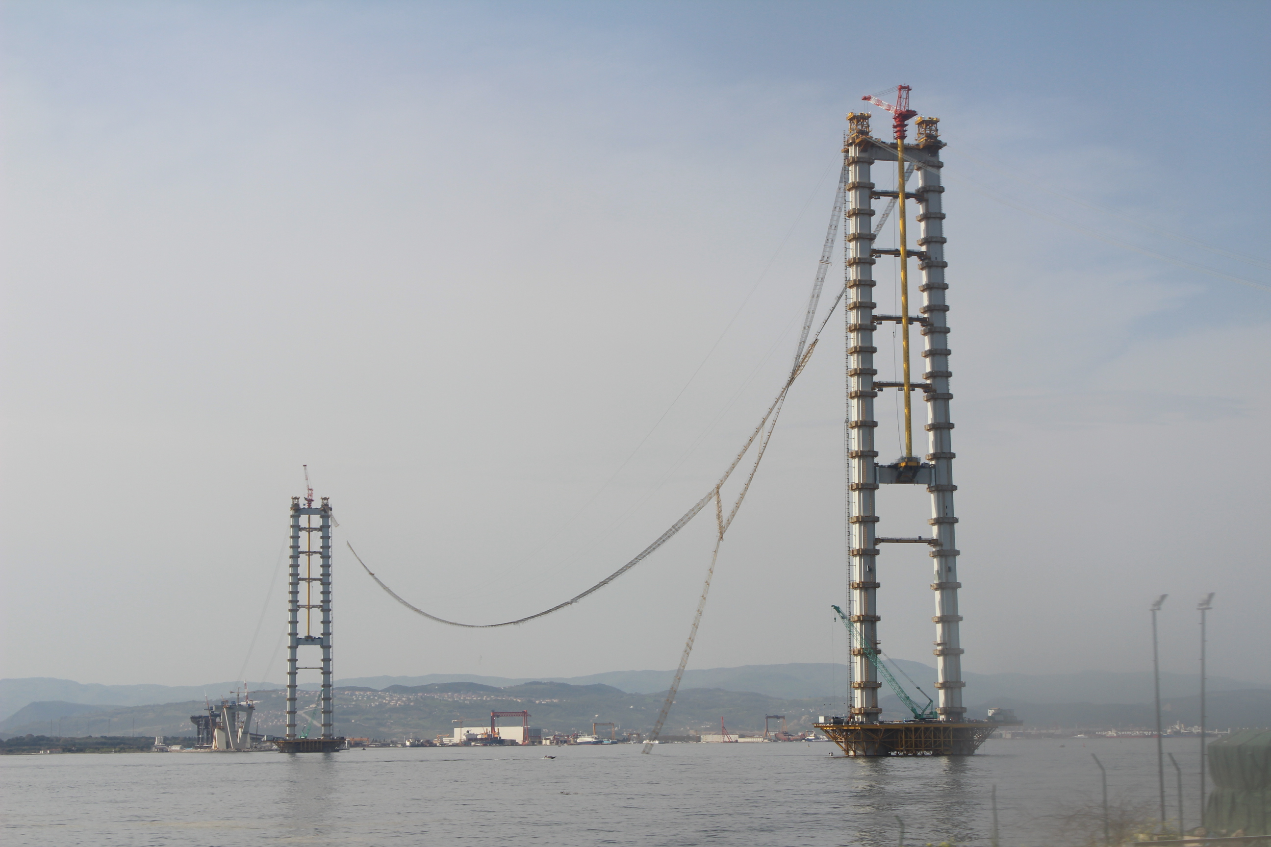 İzmit Körfez Köprüsü, inşa halinde iken.